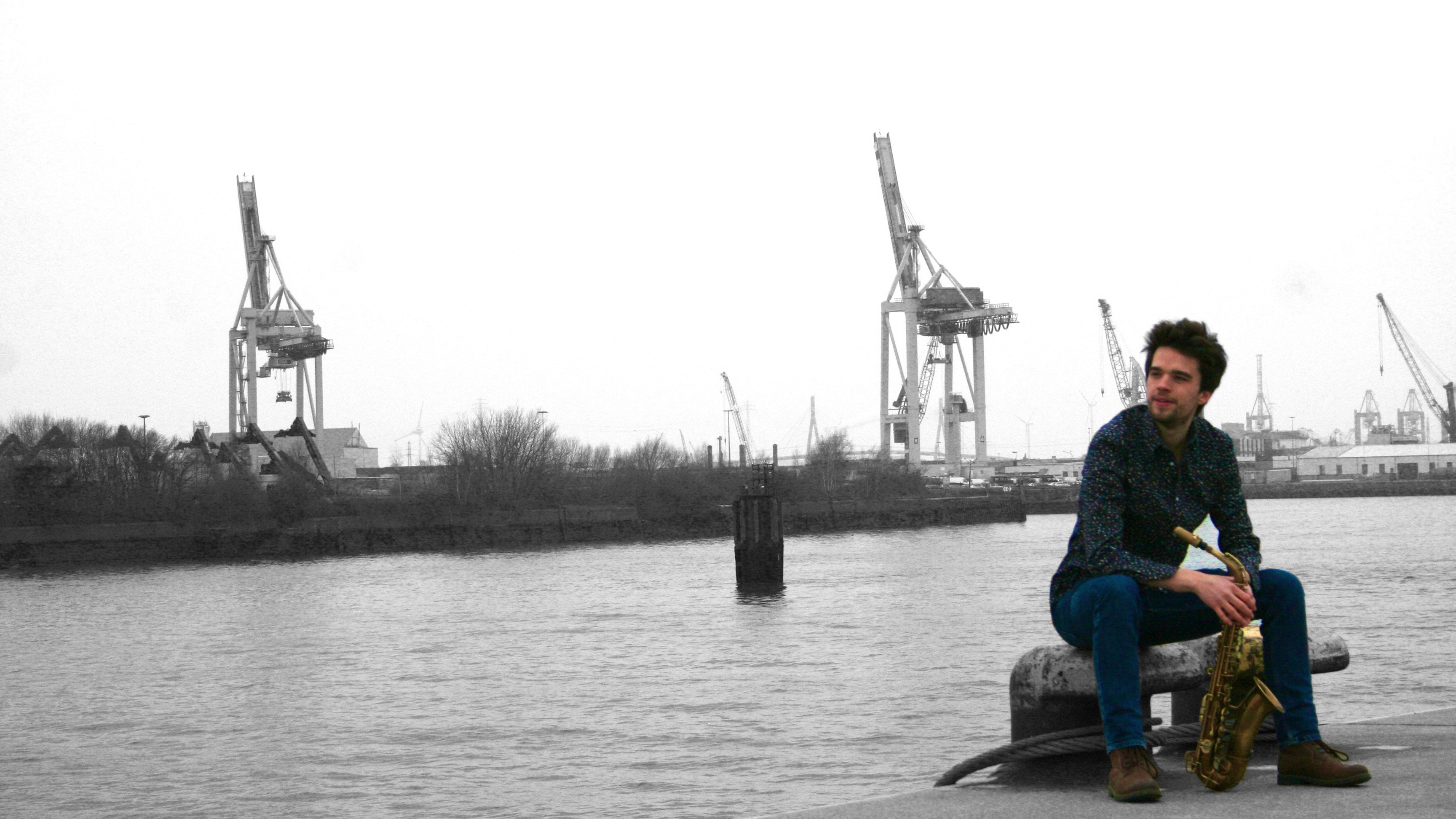 Max Boehm, 2017